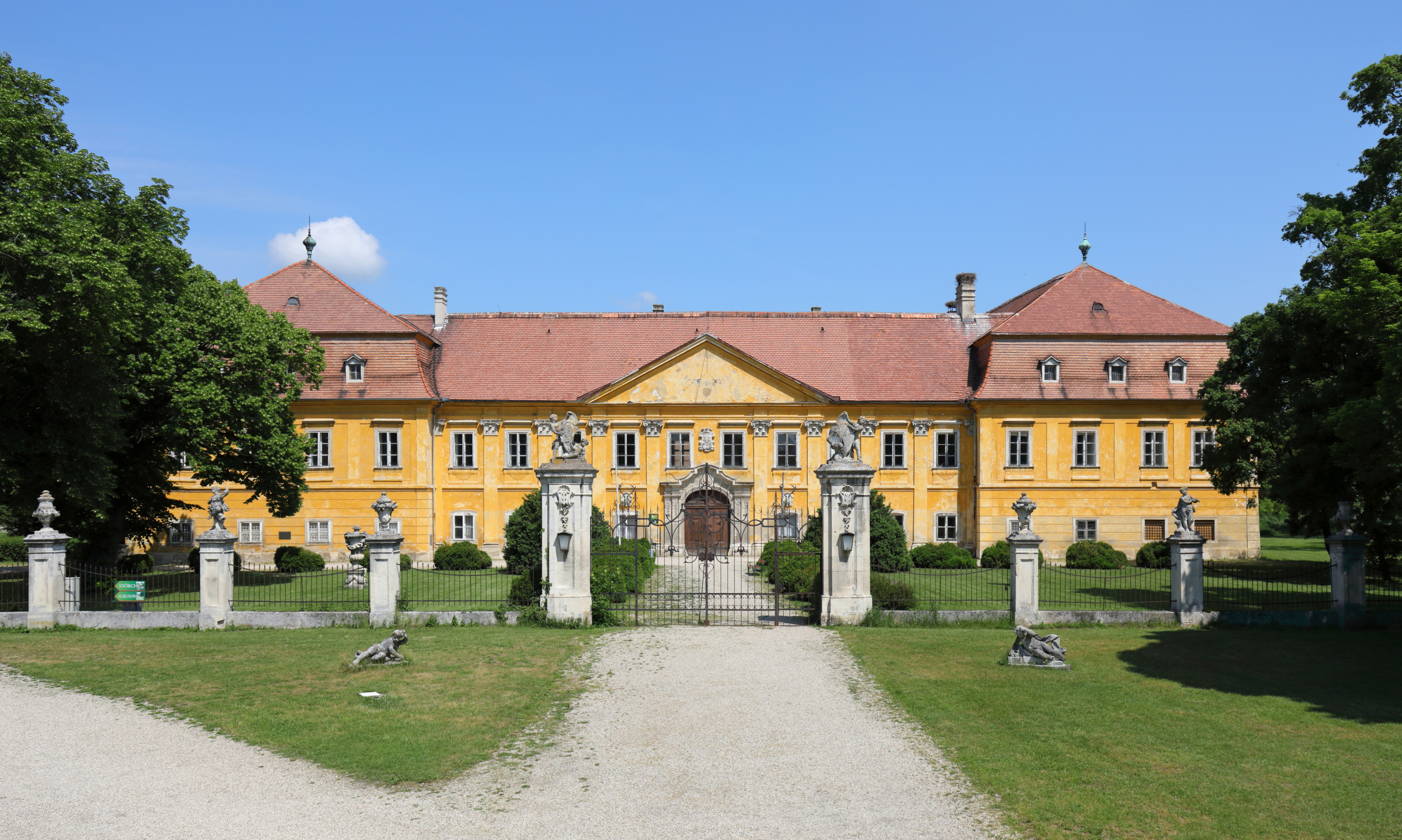 Die Hauptfassade des niederösterreichischen Schlosses Marchegg im Marchfeld. Der durchgehend zweigeschoßige und in einem großen Park liegende Bau wurde im 13. Jahrhundert als Wasserburg erbaut, in der Barockzeit umgebaut und als Jagdschloss verwendet.